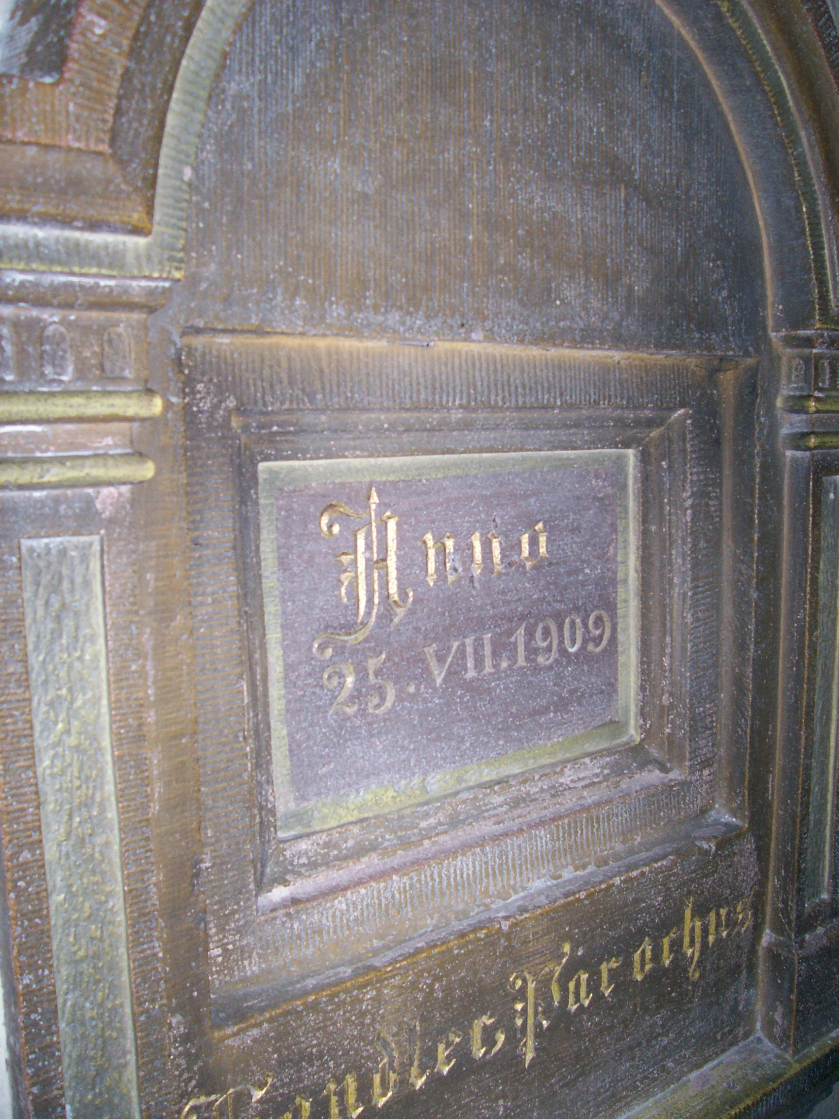 Kościół pw. Najświętszej Marii Panny w Krowiarkach: miejsce wmurowania kamienia węgielnego